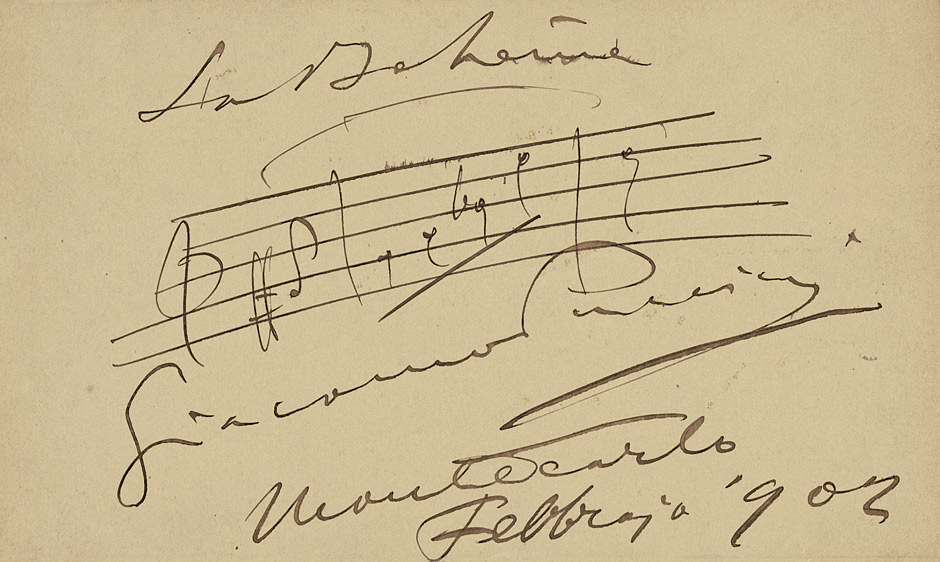 Albumblatt mit "Mi chiamano Mimi" aus La Bohème, 10,1 x 17,4 cm. Monte Carlo, Febr. 1902.